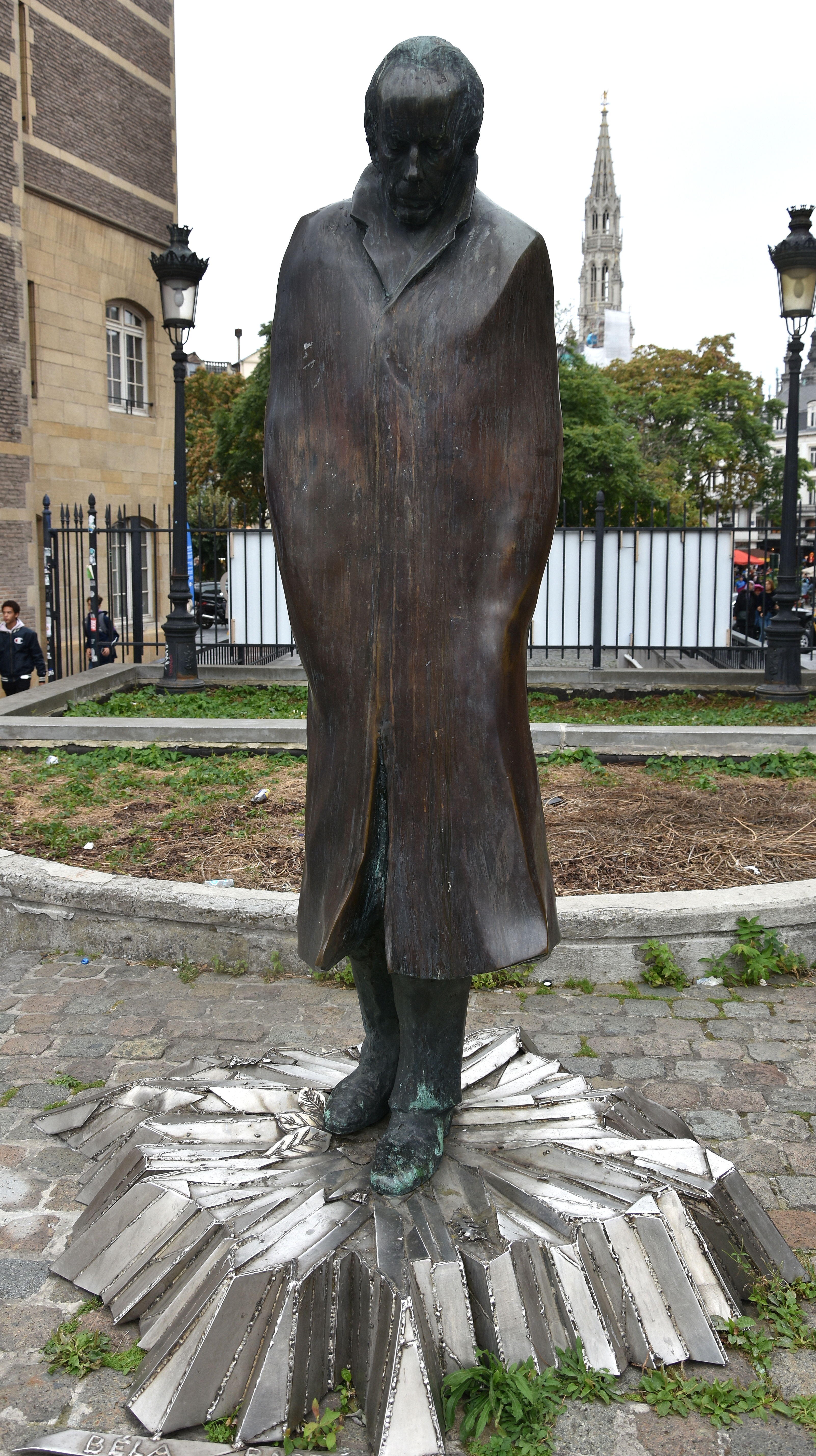 Imre Varga (1923) Béla Bartók (Brussel) 22-09-2018 This photo of immovable heritage has been taken in the Brussels Capital Region